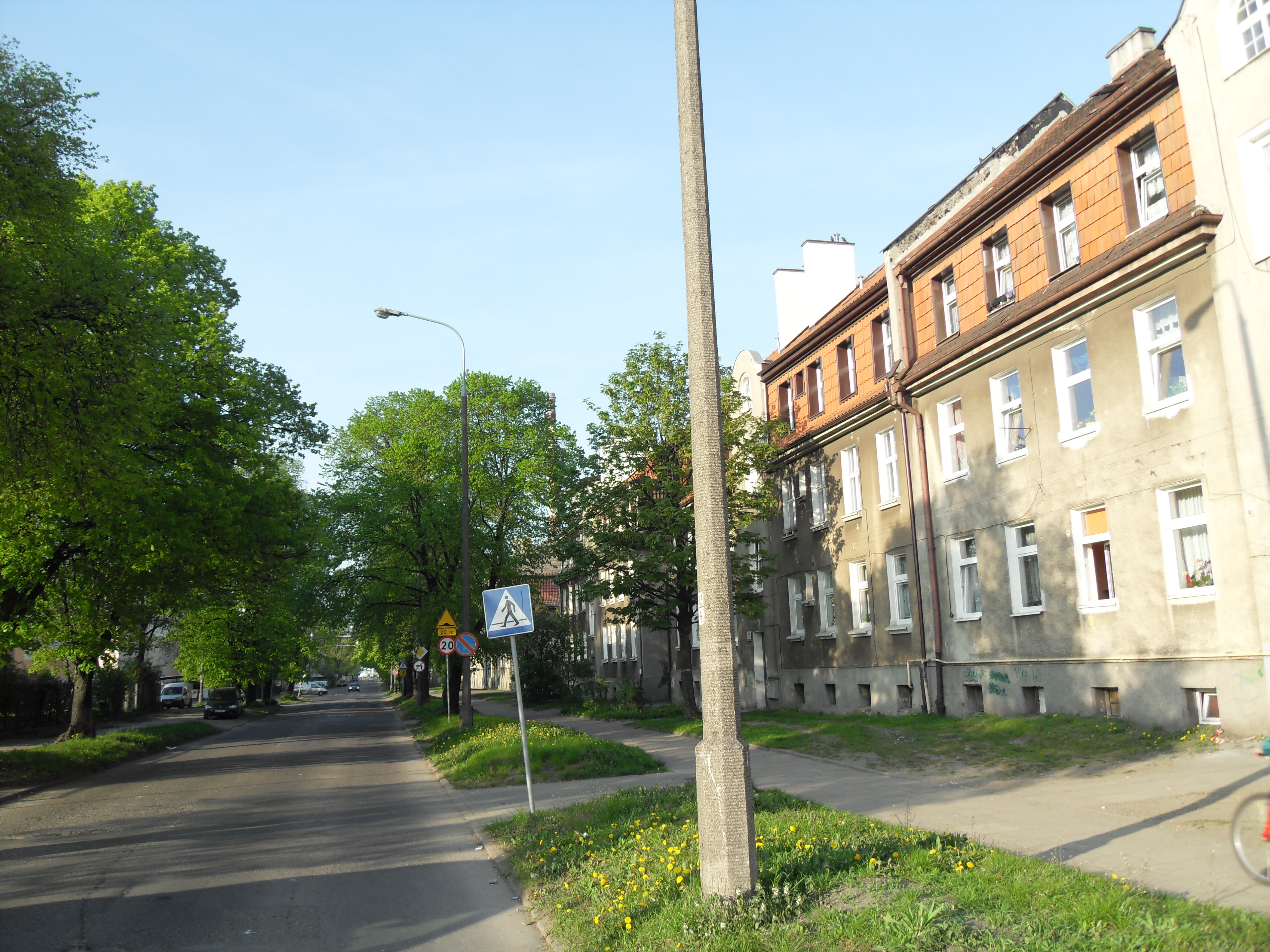 Gdańsk Młyniska, ulica Twarda.